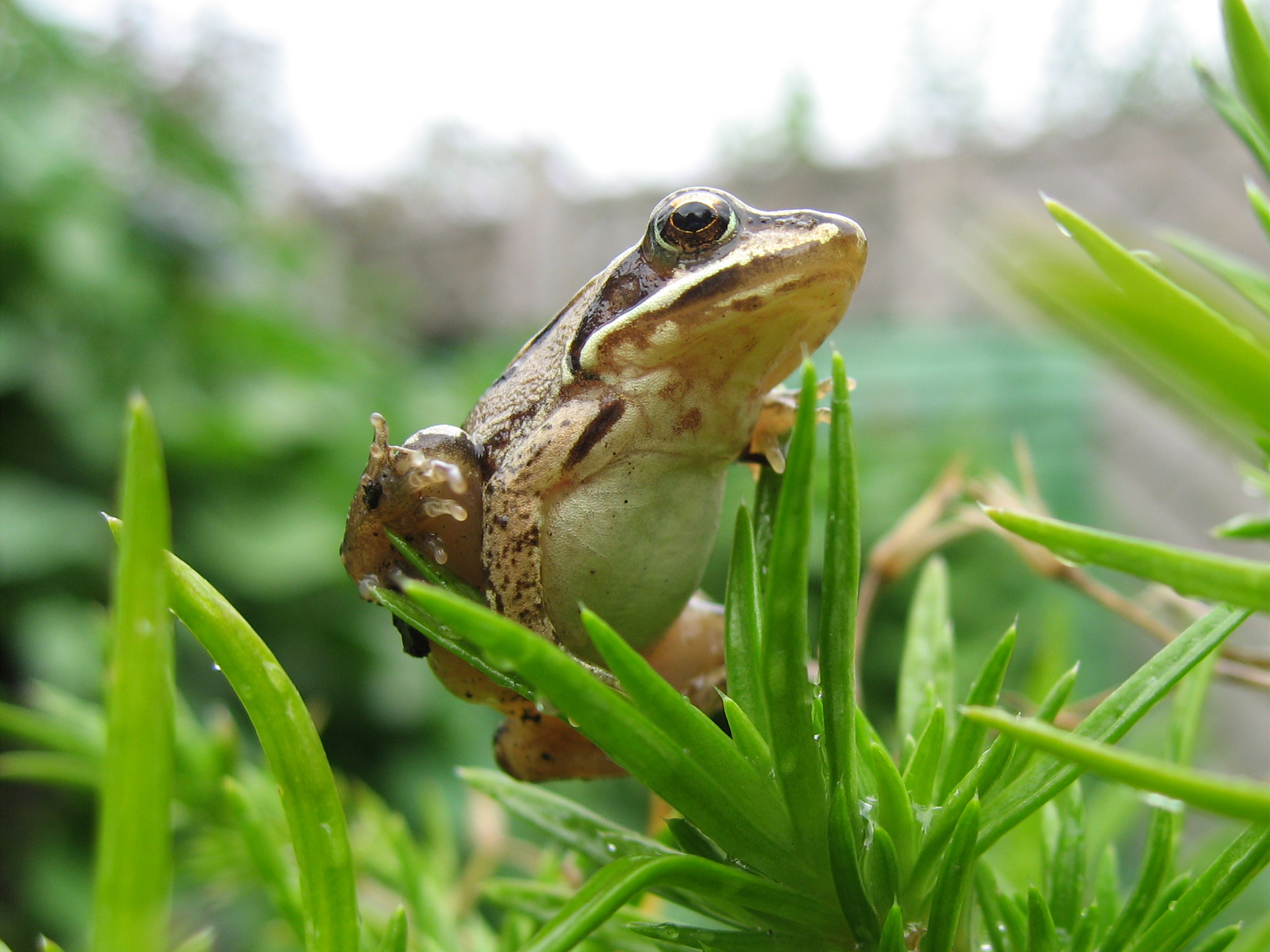 junger Springfrosch auf Polster-Phlox (Phlox subulata) im Garten, gut sichtbare Unterseite